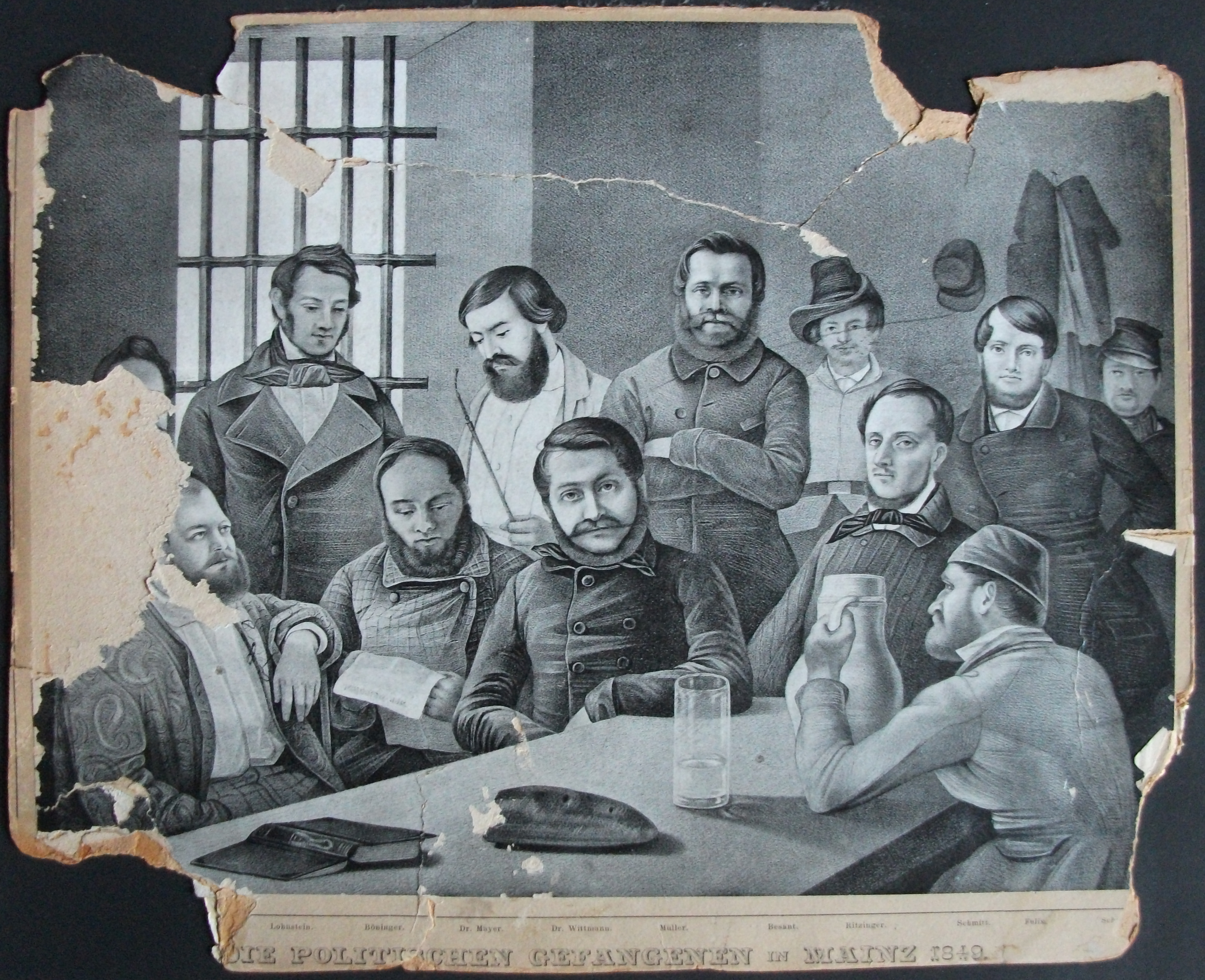 Bildunterschrift: Die politischen Gefangenen in Mainz 1849 (Mainzer Hochverratsprozess 1850) Lohnstein. Böninger. Dr. Mayer. Dr. Wittmann. Müller. Besant. Ritzinger. Schmitt. Felix. Sch